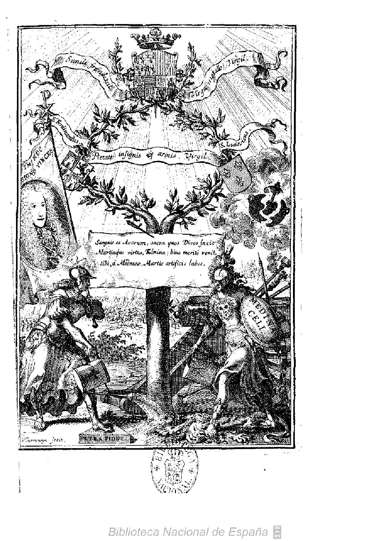 El Architecto perfecto en el arte Militar : dividido en cinco libros... Que saca á luz... el General Sebastian Fernandez Fernandez de Medrano Autor: Fernández de Medrano, Sebastián (1646-1705) Fecha: 1708 Datos de edición: En Amberes. Por Henrico y Cornelio Verdussen.